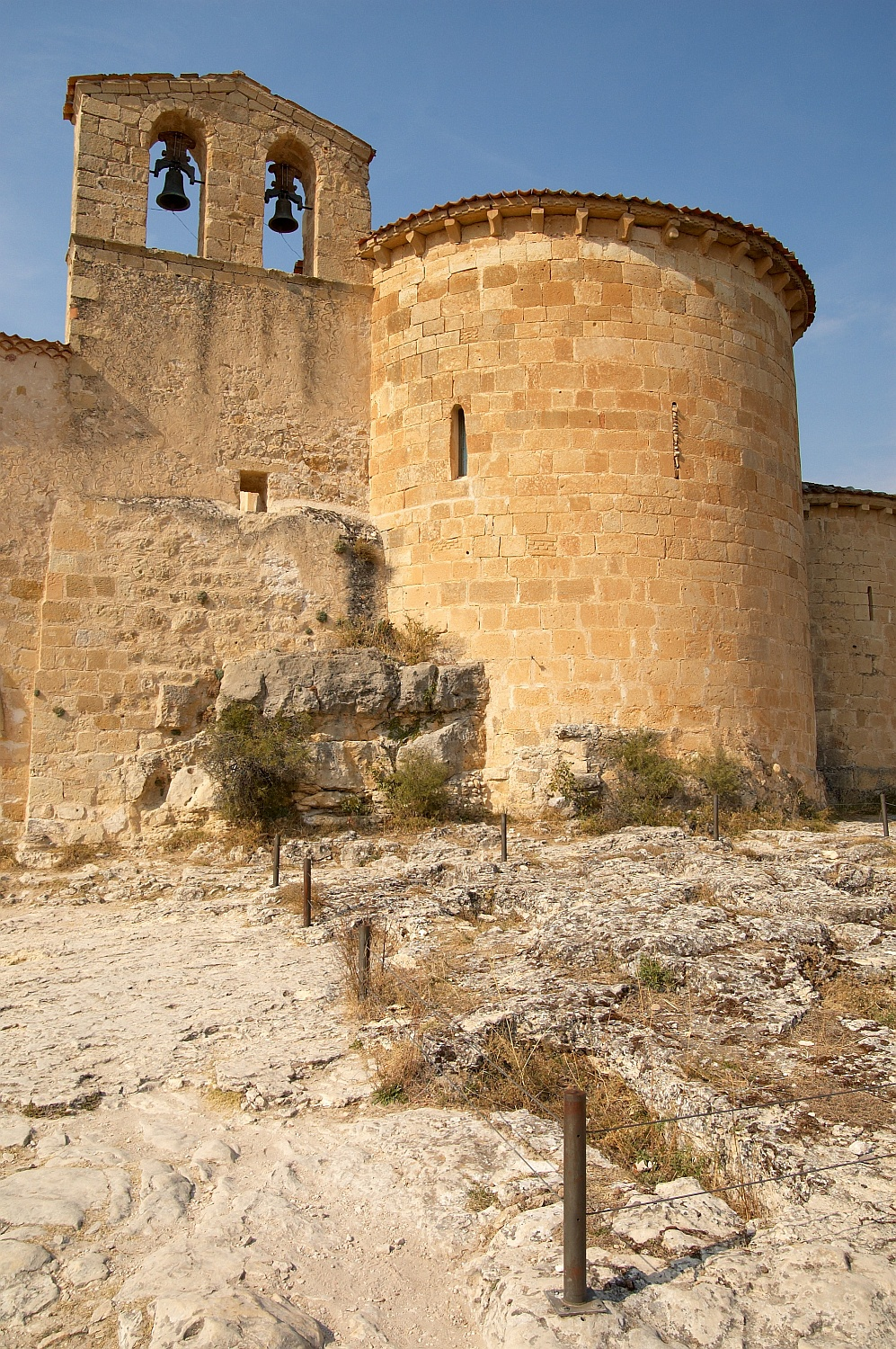 Necrópolis